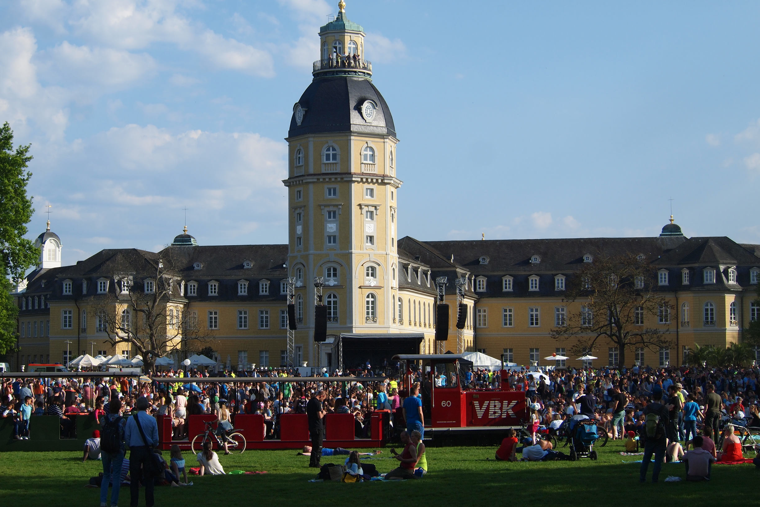 Schlossgartenbahn Karlsruhe beim Christival 2016